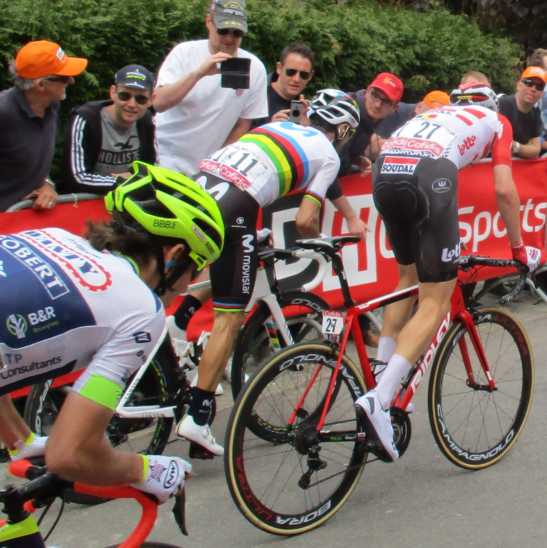 Laatste passage van de Waalse Pijl 2019 voor mannen op de Mur de Huy